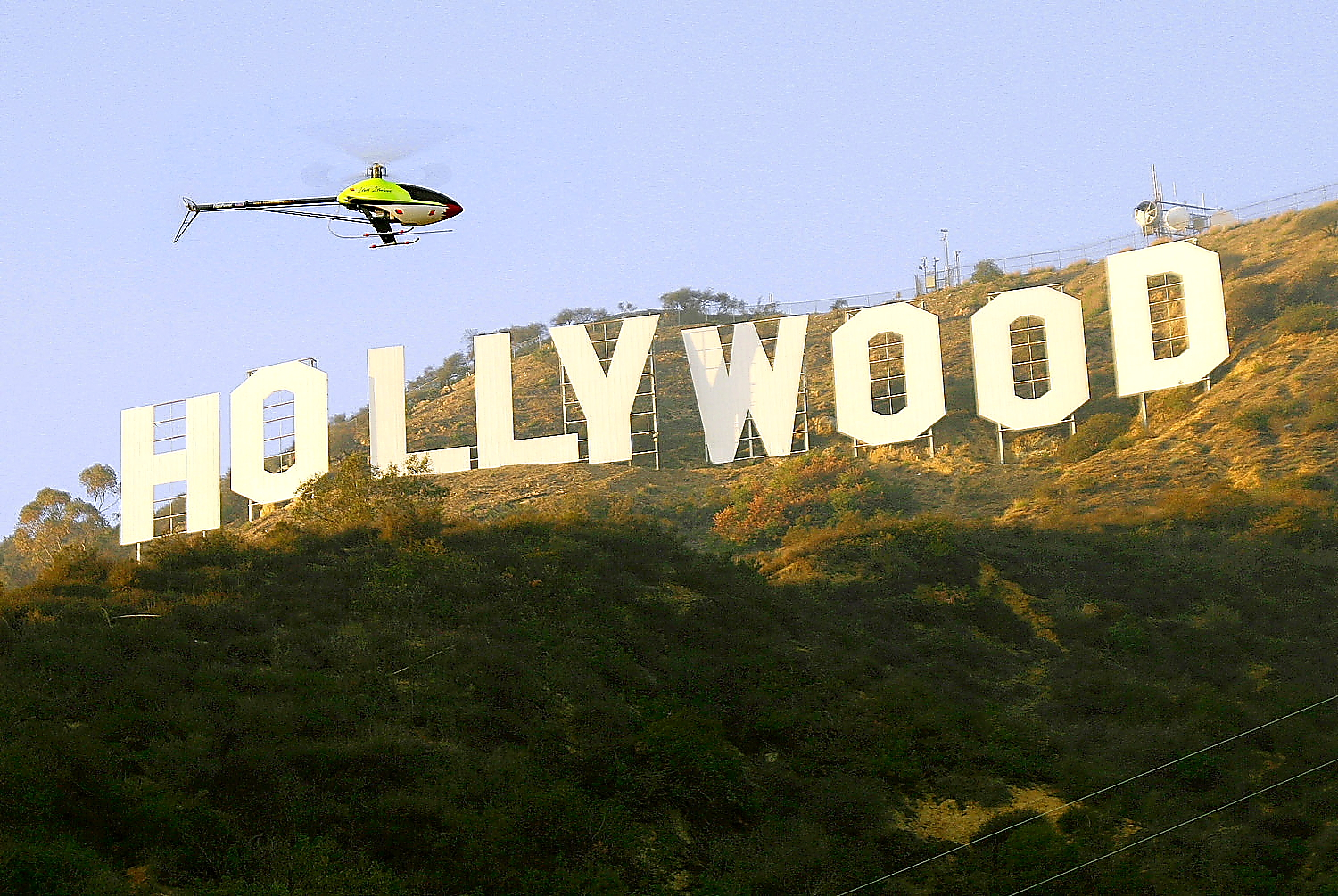 World Scenic Flights in California- World Scenic Flights Kulisse Hollywood-Schriftzug